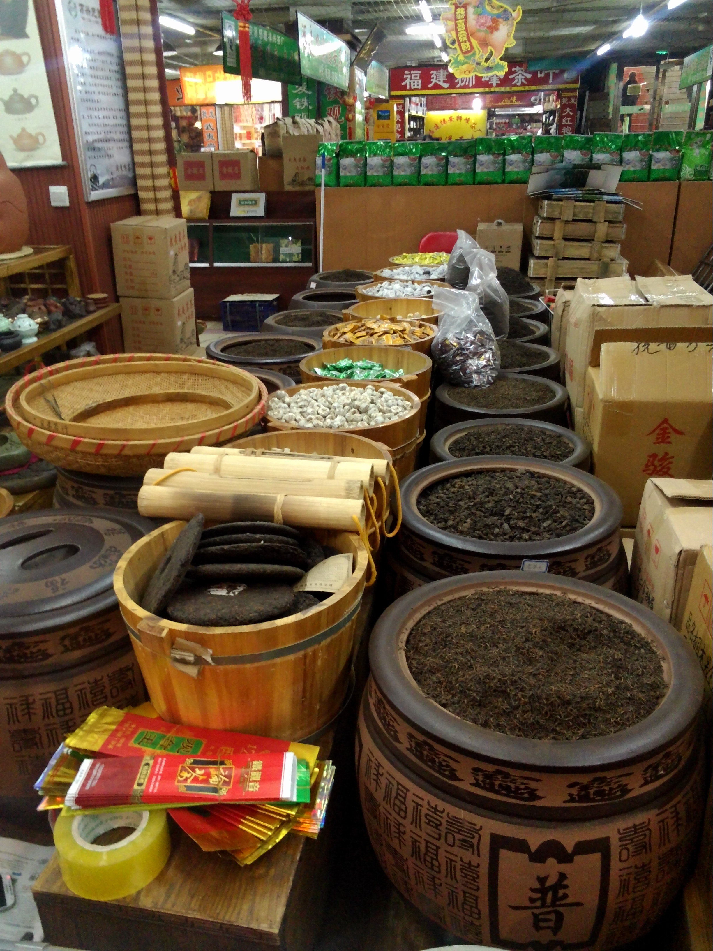 Магазин чаю у місті Далянь, Китай.